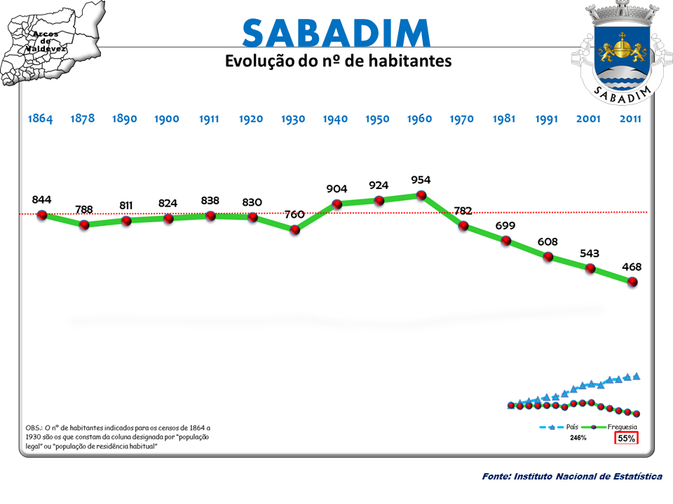 Censos 1864/2011